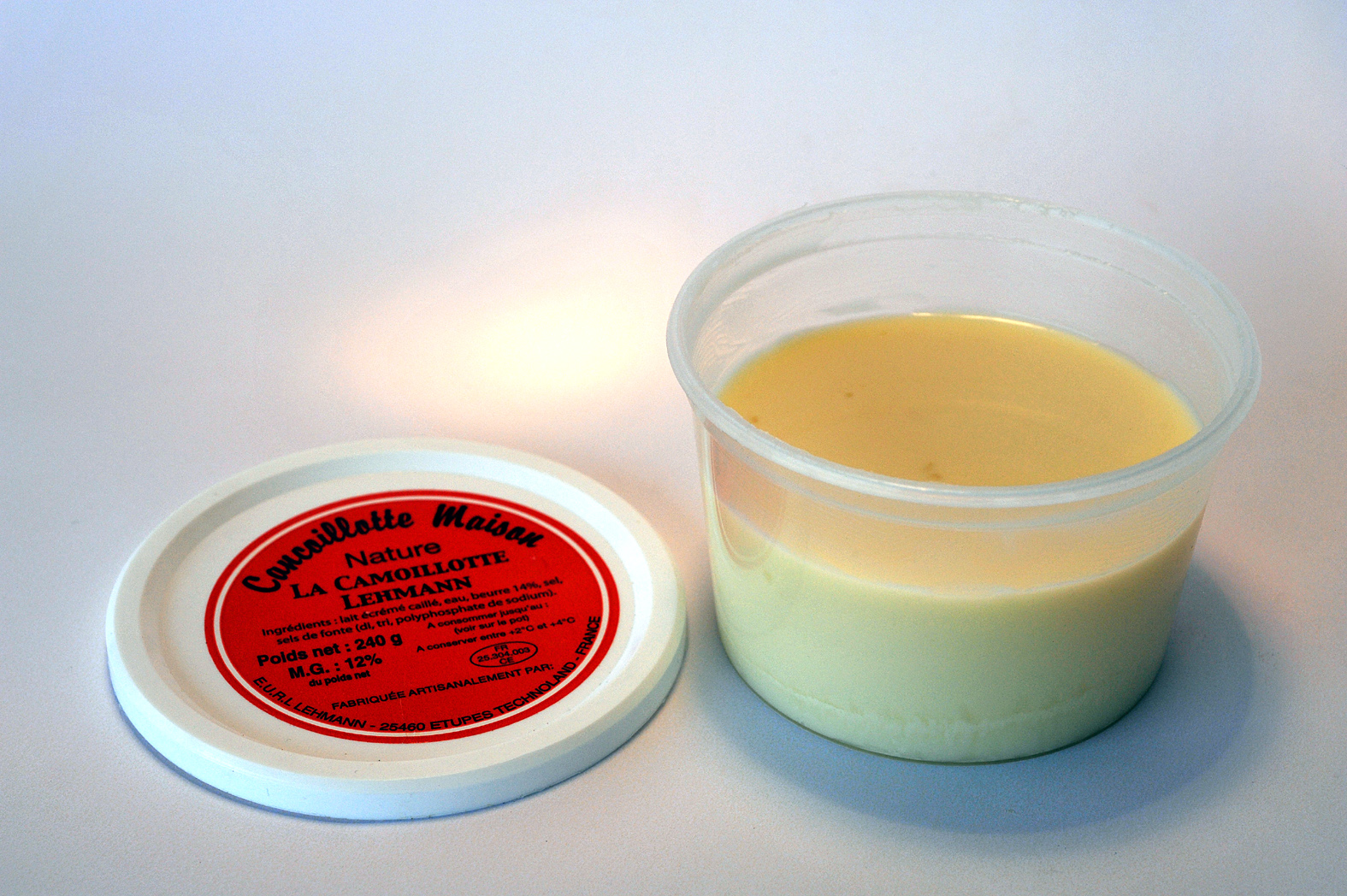 Cancoillotte, un fromage semi-liquide de la région Franche-Comté, France.